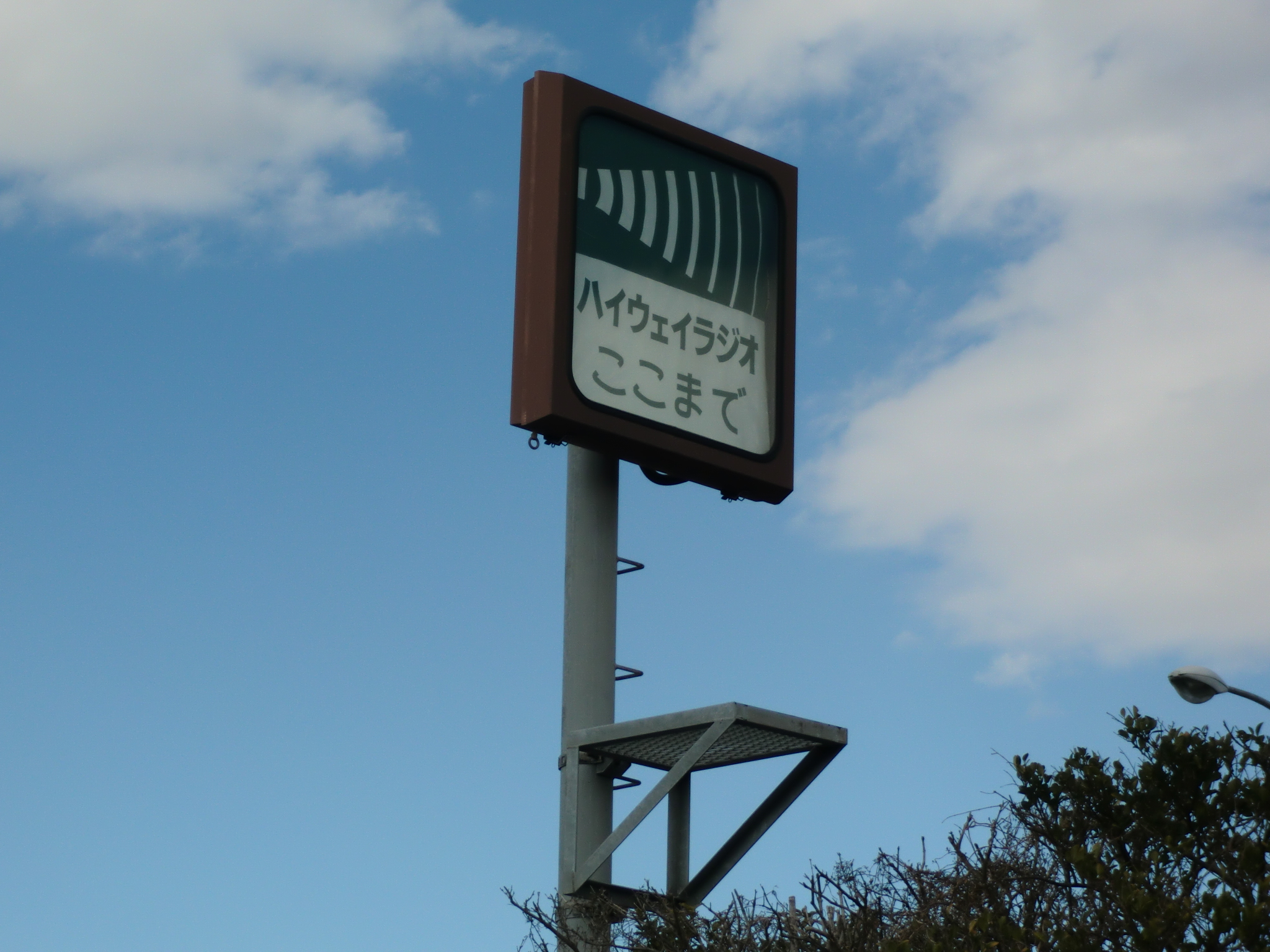 ハイウェイラジオここまで（埼玉県久喜市の東北道で撮影）